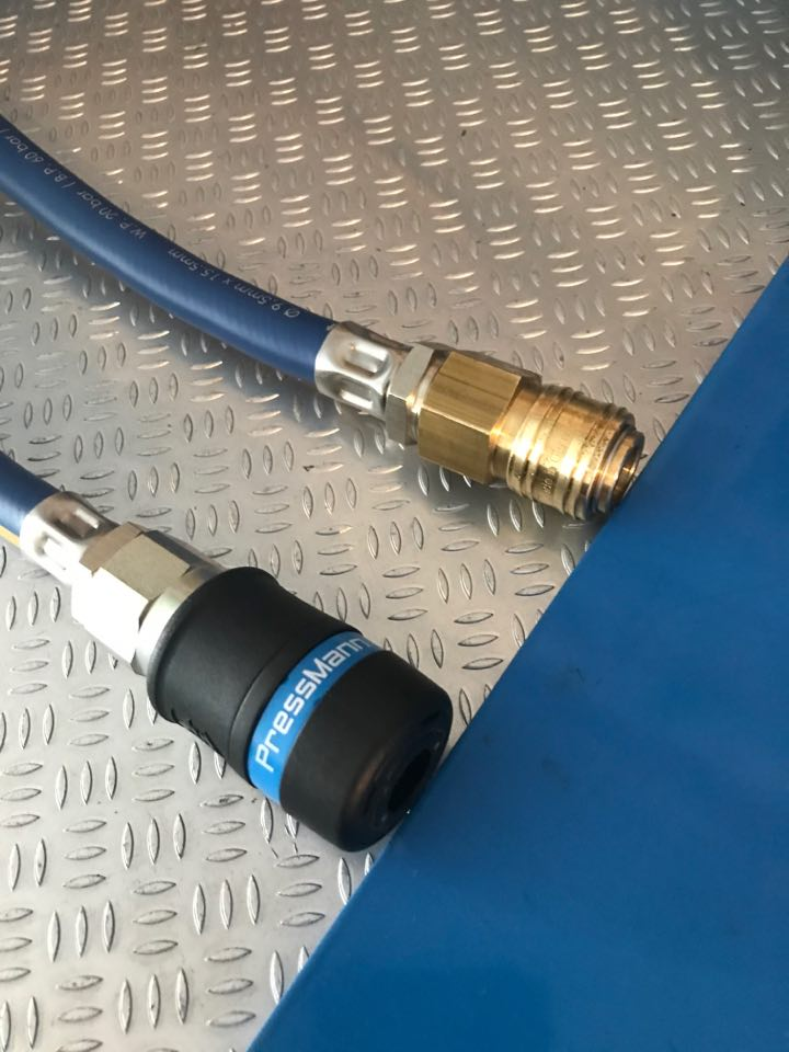 Dwa rodzaje szybkozłączy - szybkozłączka bezpieczna przemysłowa oraz klasyczna, zwykła